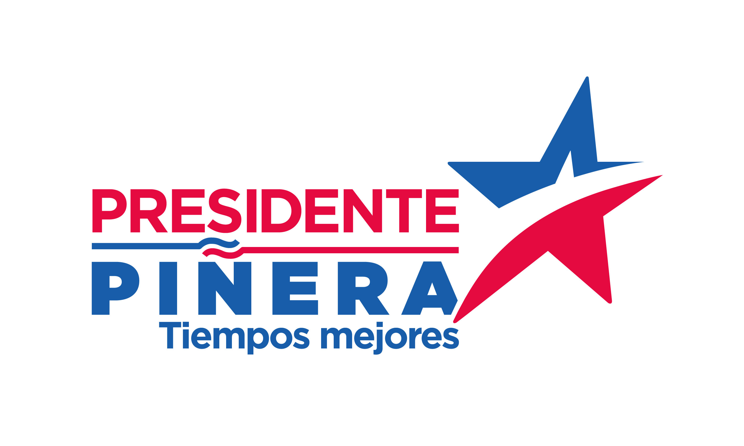 Logo utilizado por la campaña presidencial de Sebastián Piñera en 2017.